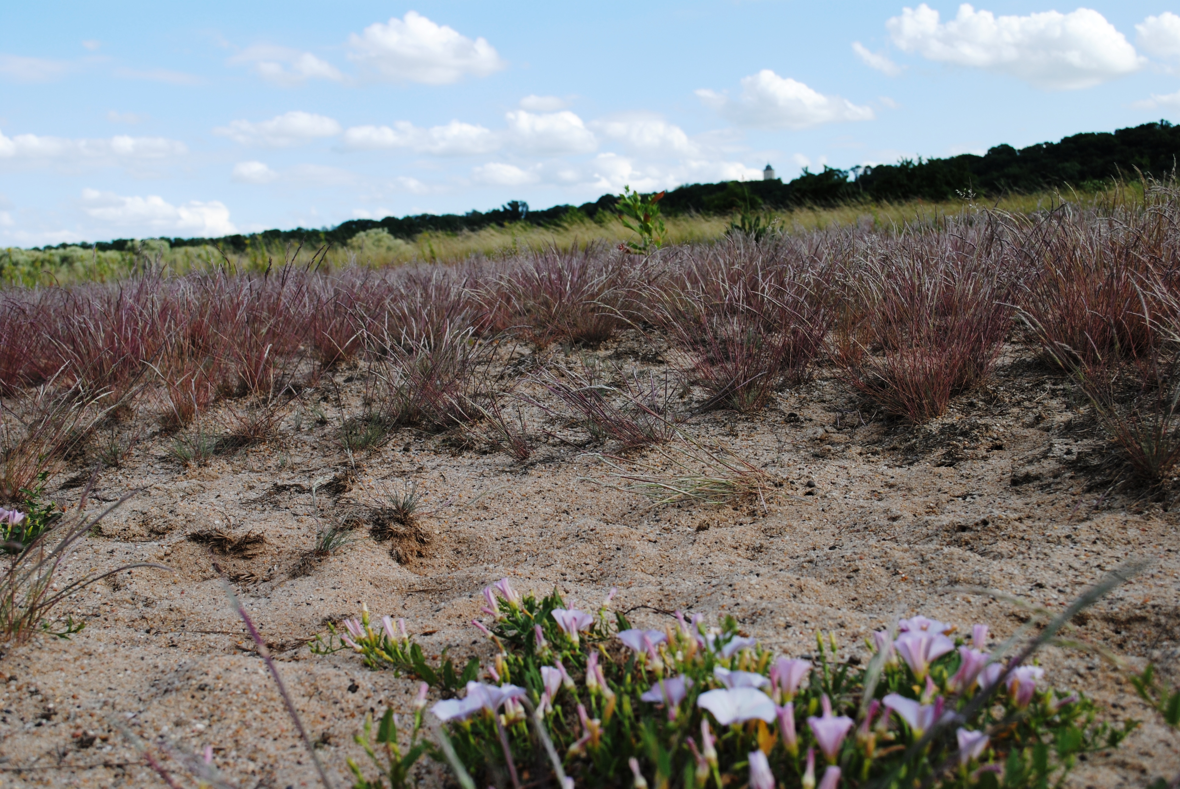 Naturschutzgebiet, Astheimer Dürringswasen, Sandgrasheiden, unterhalb der Hallburg